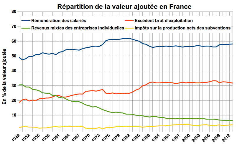 Partage de la valeur ajoutée en France. Données de l'INSEE.